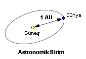 Astronomik birim. (Kullanıcı Antares'in oluşturduğu resim.)